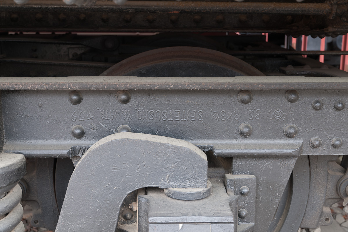 国鉄TR13形台車の球山形鋼フレームと刻印。碓氷鉄道文化村の保存車スニ（スエ）30 8。